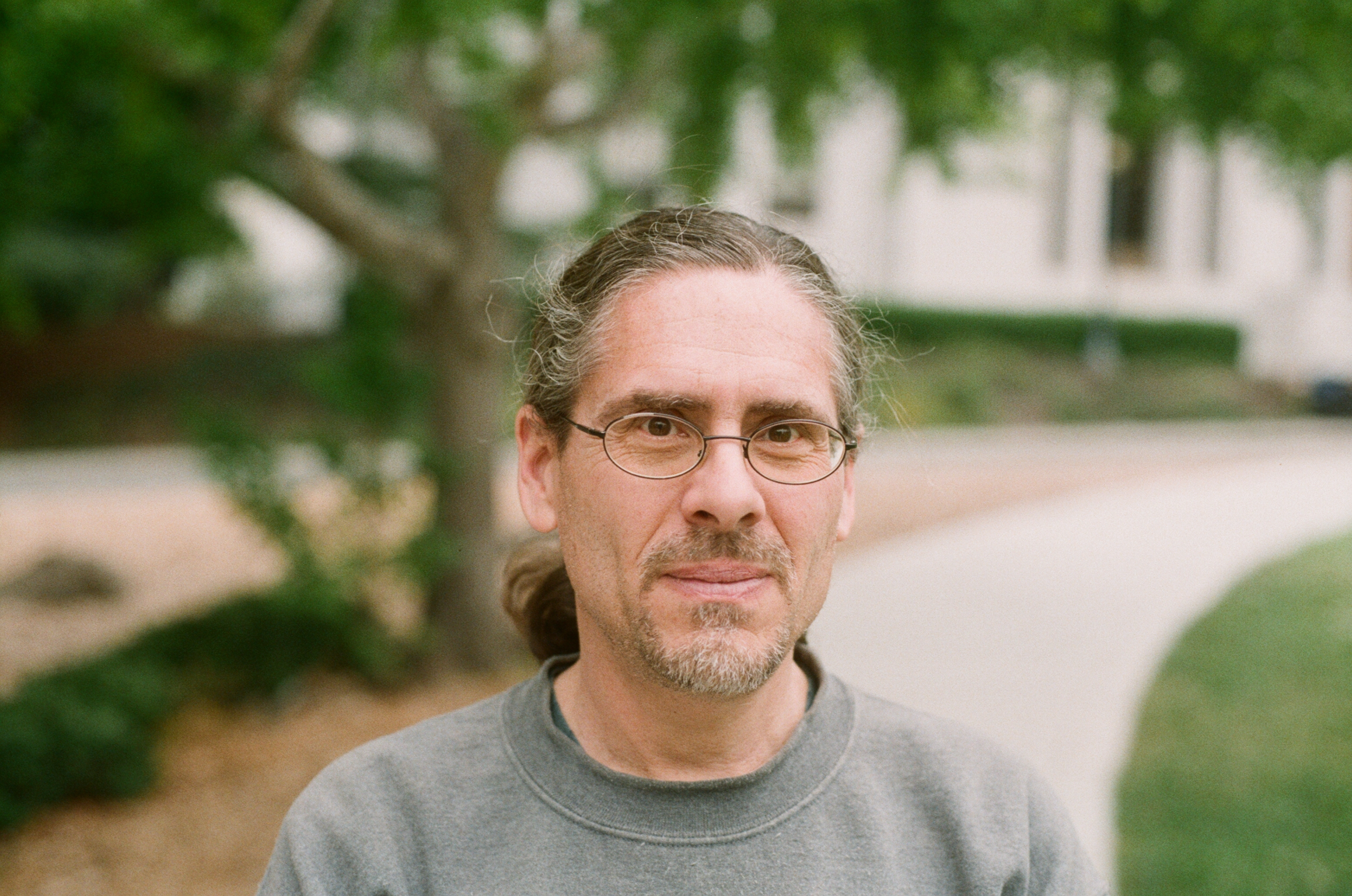 Foto di Mark Haiman